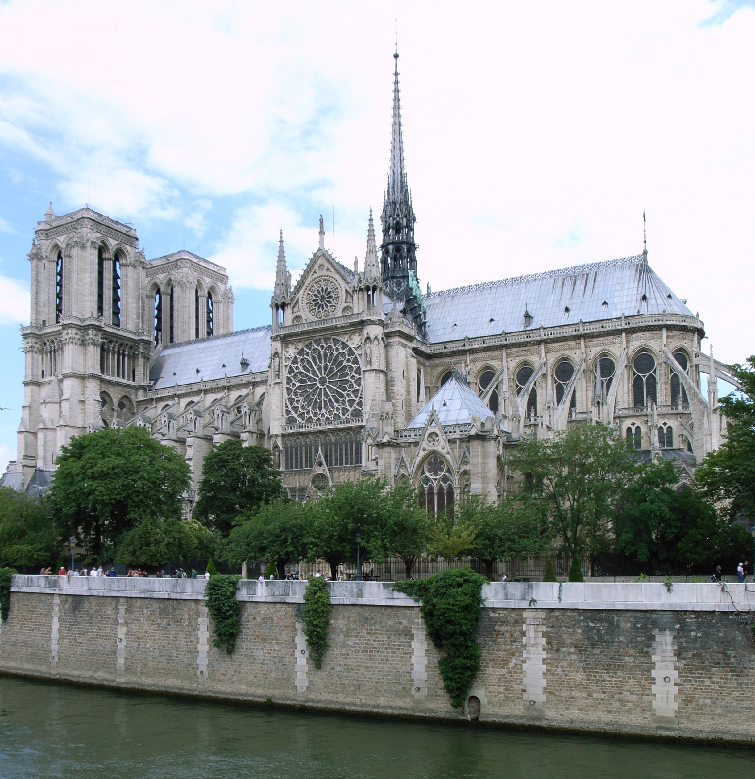 Vu sur la Cathédrale Notre Dame de Paris et sur le Quai de l'Archevêché